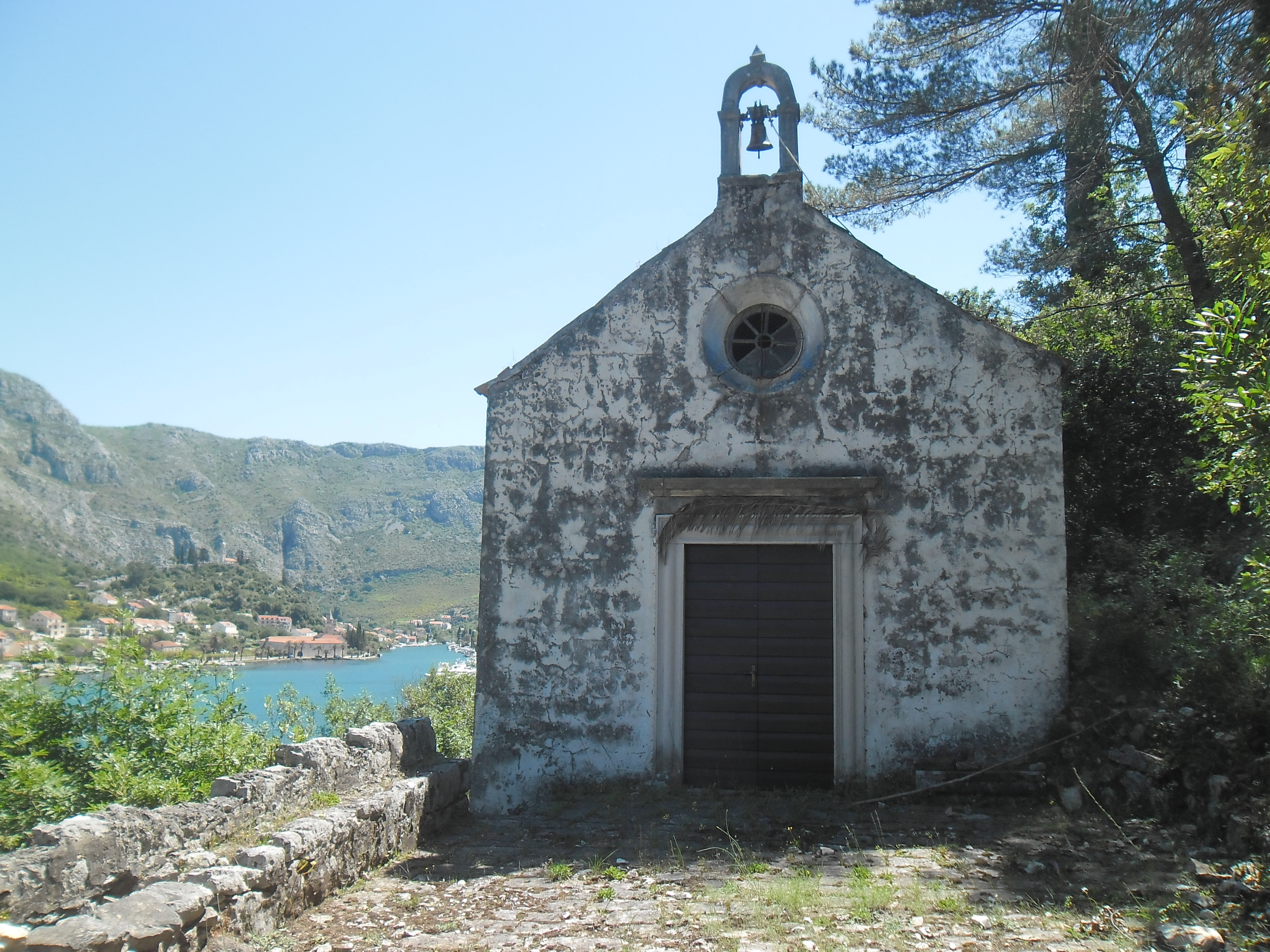 crkva u Čajkovićima u Rijeci dubrovačkoj